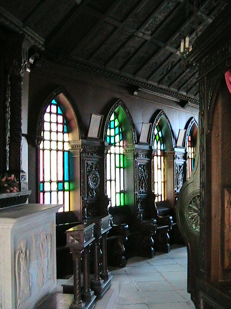 BERCETO - Passo della Cisa - Santuario di Nostra Signora della Guardia